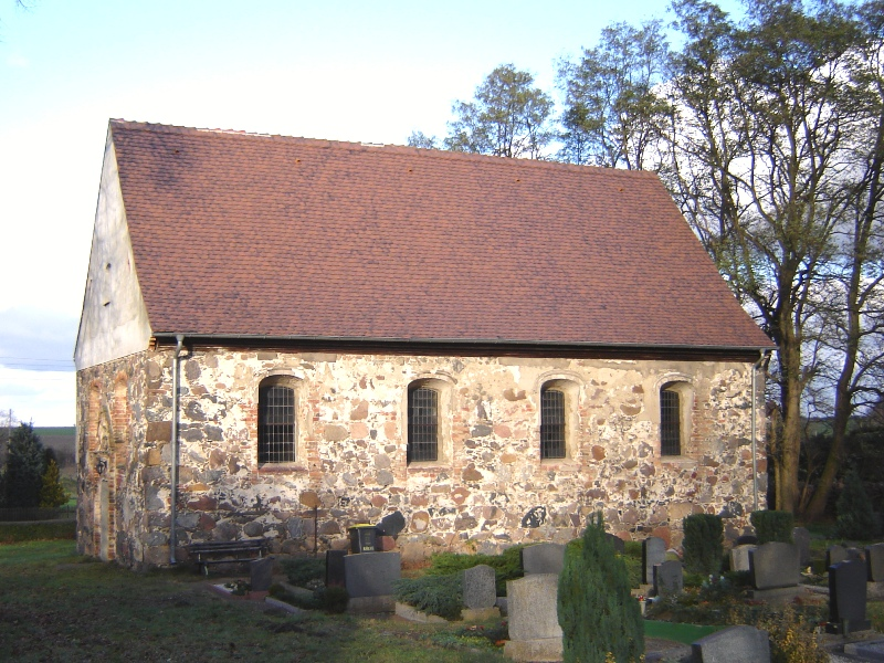 Kirche in Hobeck-Göbel, Sachsen-Anhalt